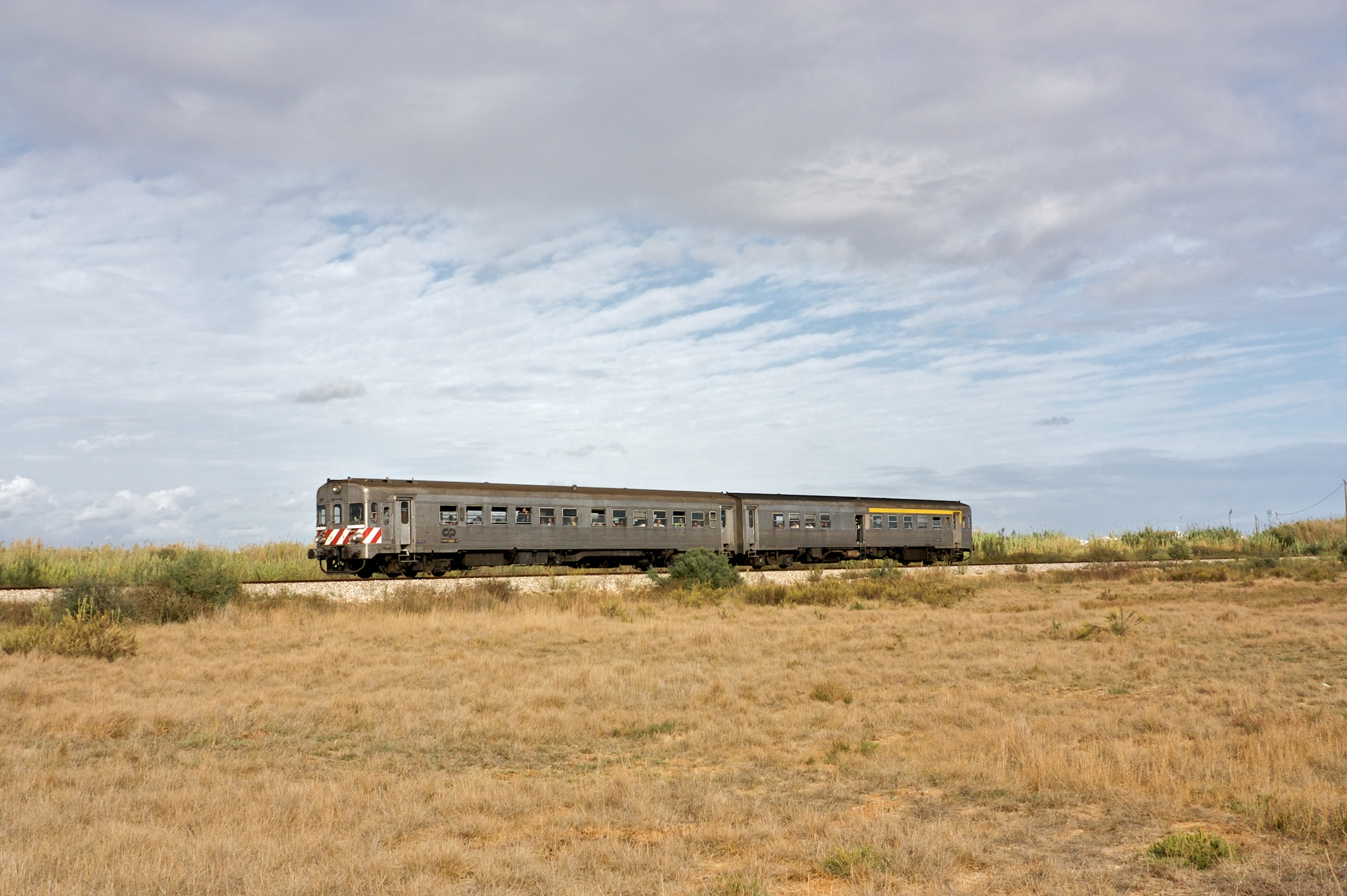 Tipo: Comboio Regional 5720 [Tavira - Faro] Local: Belamandil (Olhão) [Linha do Algarve, PK 347] Data e hora: 21 de Outubro de 2009 [15h46] Material: Automotora 0602 [Unidade Dupla Diesel]